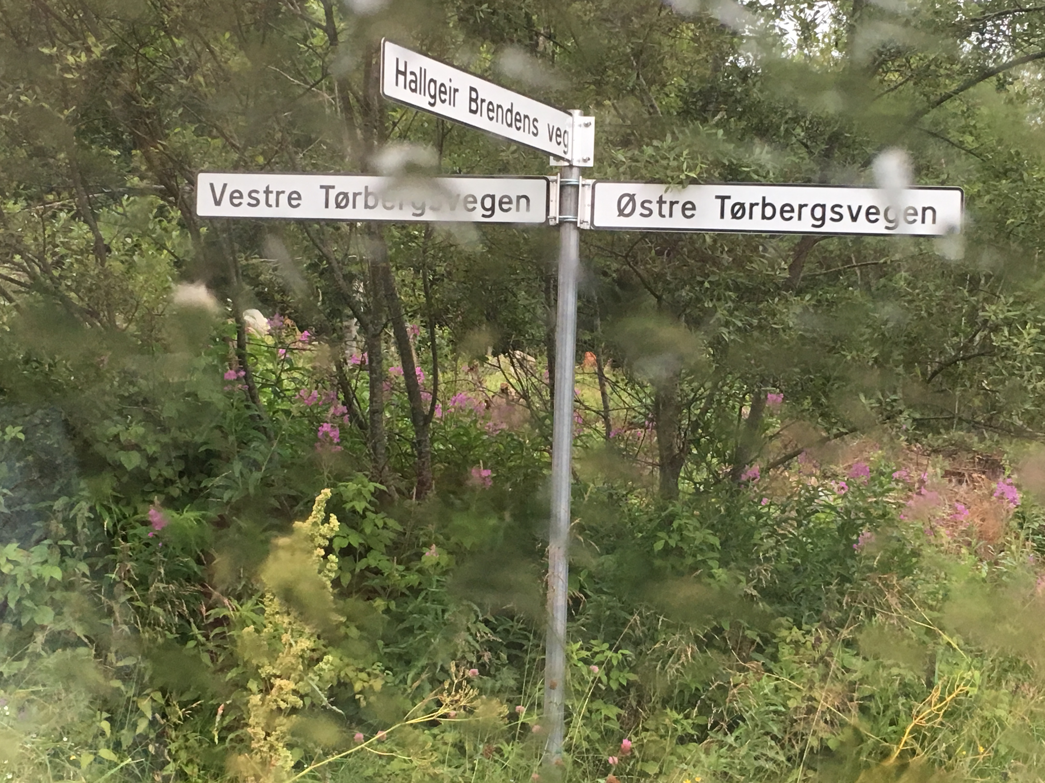 Veiskilt i grenda Tørberget, Hedmark.